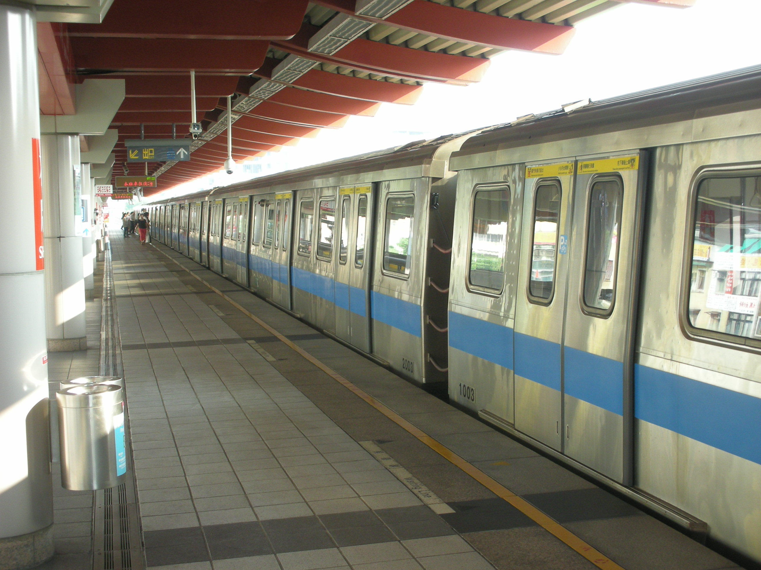 台北捷運C301型電聯車停靠石牌站第一月台。